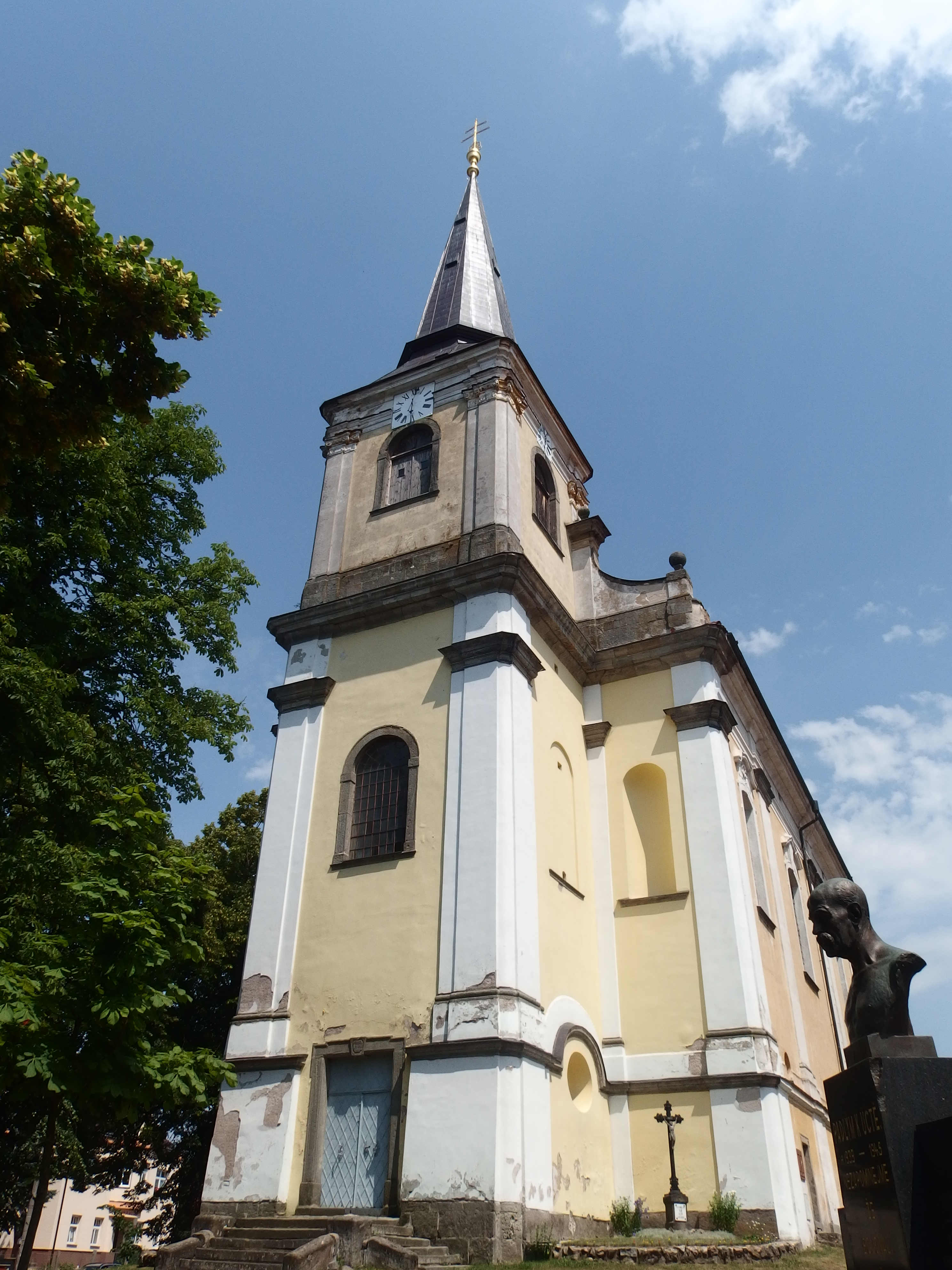 Kostel svatých Filipa a Jakuba, Trhová Kamenice.